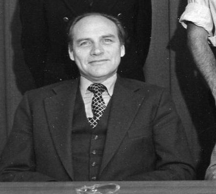 Uit de bron: Groepsportret van het College van Burgemeesters en Wethouders van de gemeente Utrecht, met staande van links naar rechts loco-secretaris J. Berger, dr. J. Rosenberg, mevr. W. Velders-Vlasblom, mr. S. Torensma en A. van Hassel (wethouders) en zittende van links naar rechts mr. A. Bransen, W.J. Vergeer (wethouders), burgemeester H.J.L. Vonhoff, gemeentesecretaris B. Burger en wethouder C. Pot.